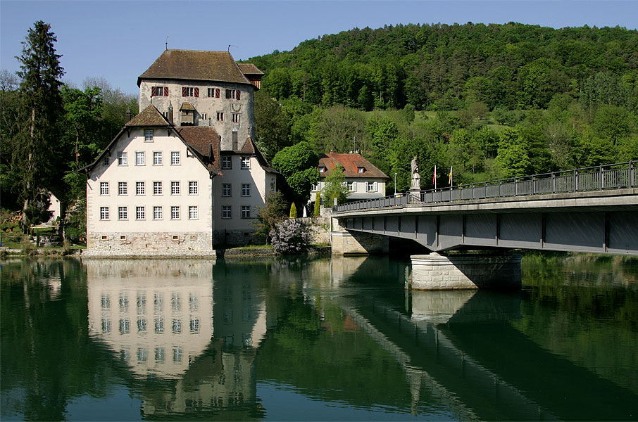 Schloss Rötteln (Rotwasserstelz) in Hohentengen gegenüber von Kaiserstuhl